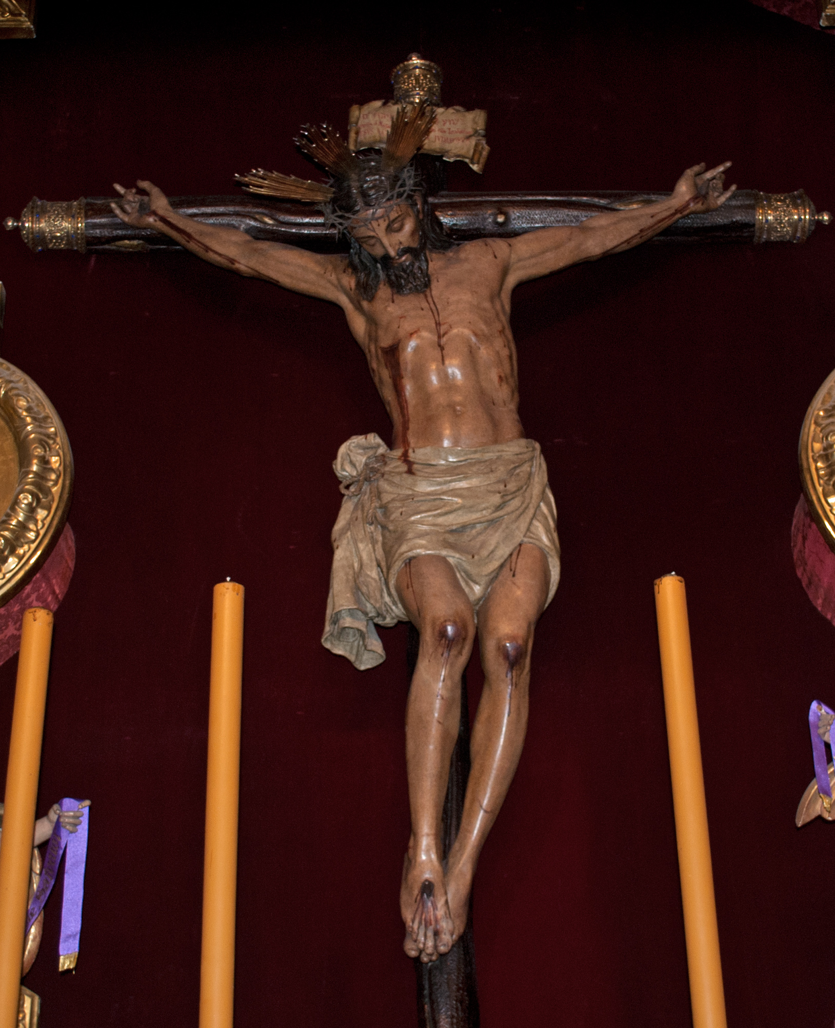 Cristo de Burgos, realizado en 1573 por Juan Bautista Vázquez el Viejo. Semana Santa de Sevilla